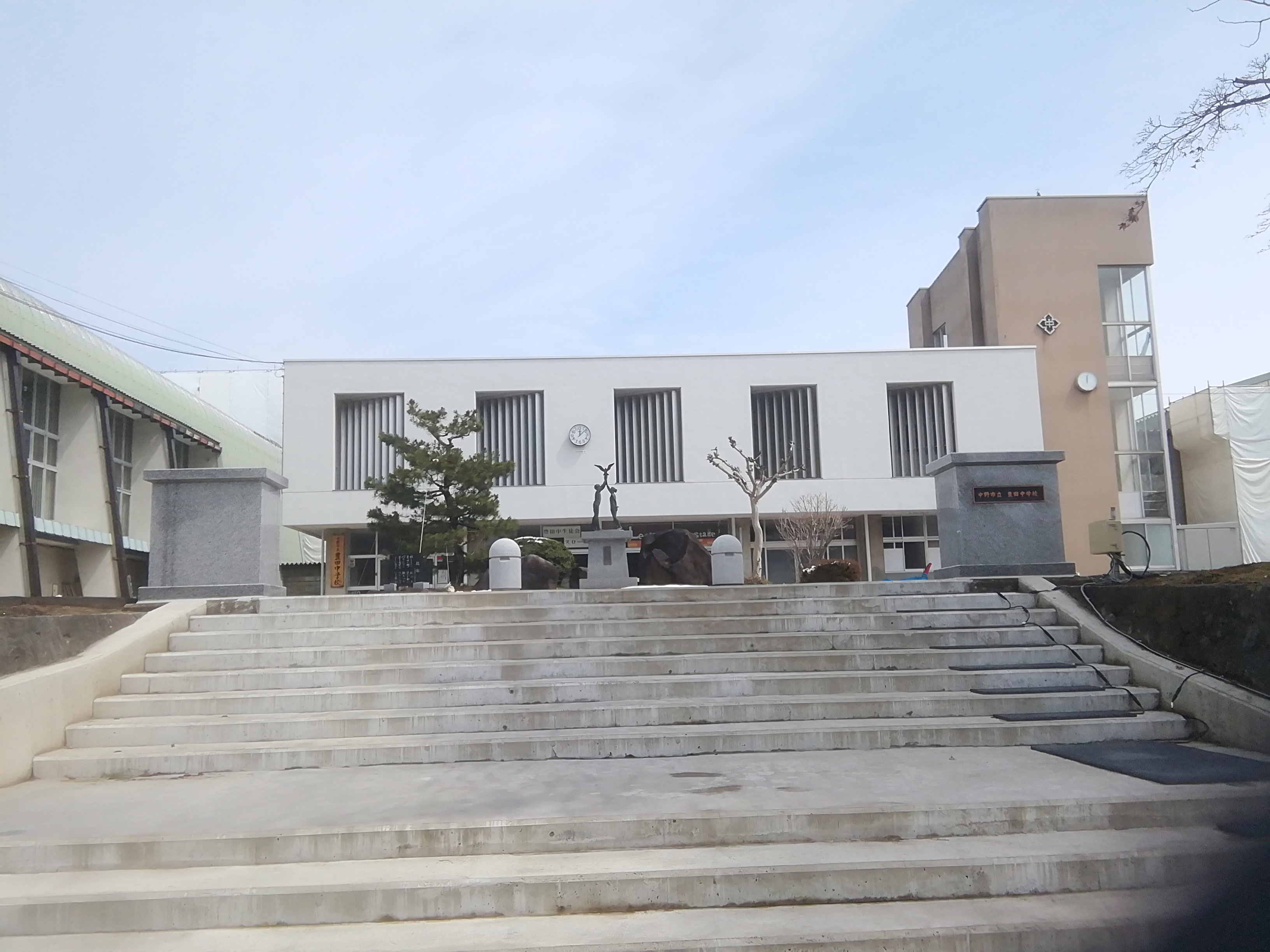 中野市立豊田中学校（2020-3-30）